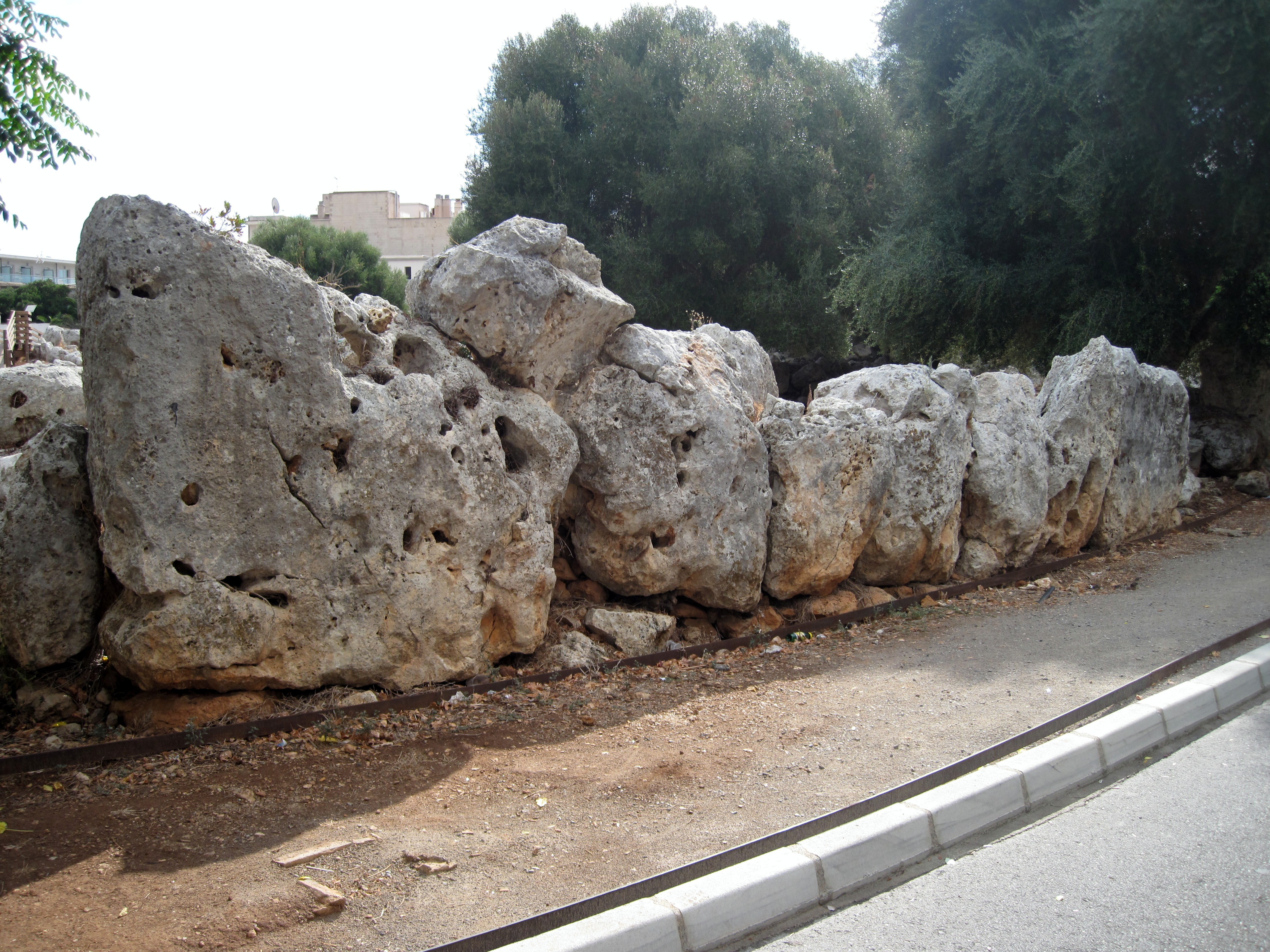 Westliche Großsteinmauer des talaiotischen Dorfes von S’Illot (Poblat talaiòtic de s’Illot), Gemeinde Sant Llorenç des Cardassar, Mallorca, Spanien